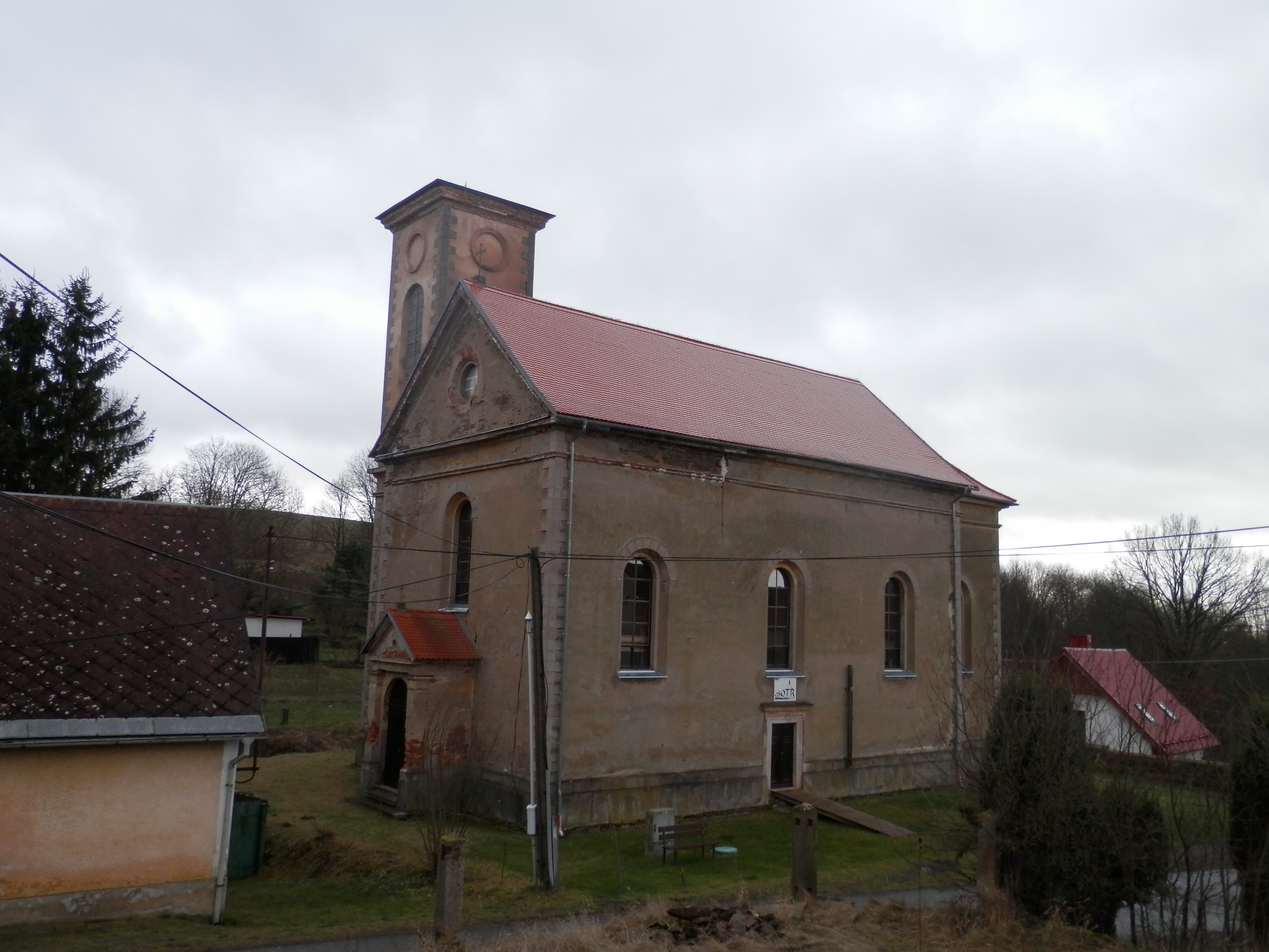 Boněnov, kostel Všech svatých